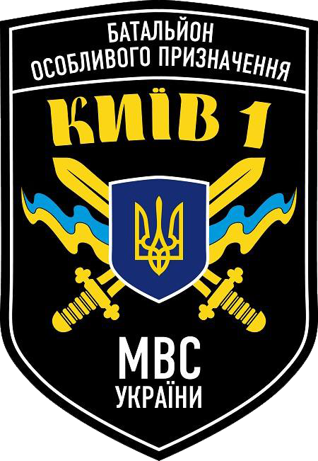 Шеврон спецбатальйону міліції «Київ-1»